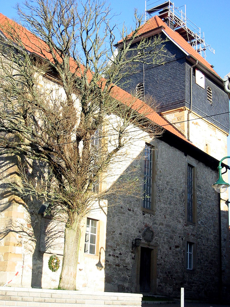 Westenfeld Dorfkirche